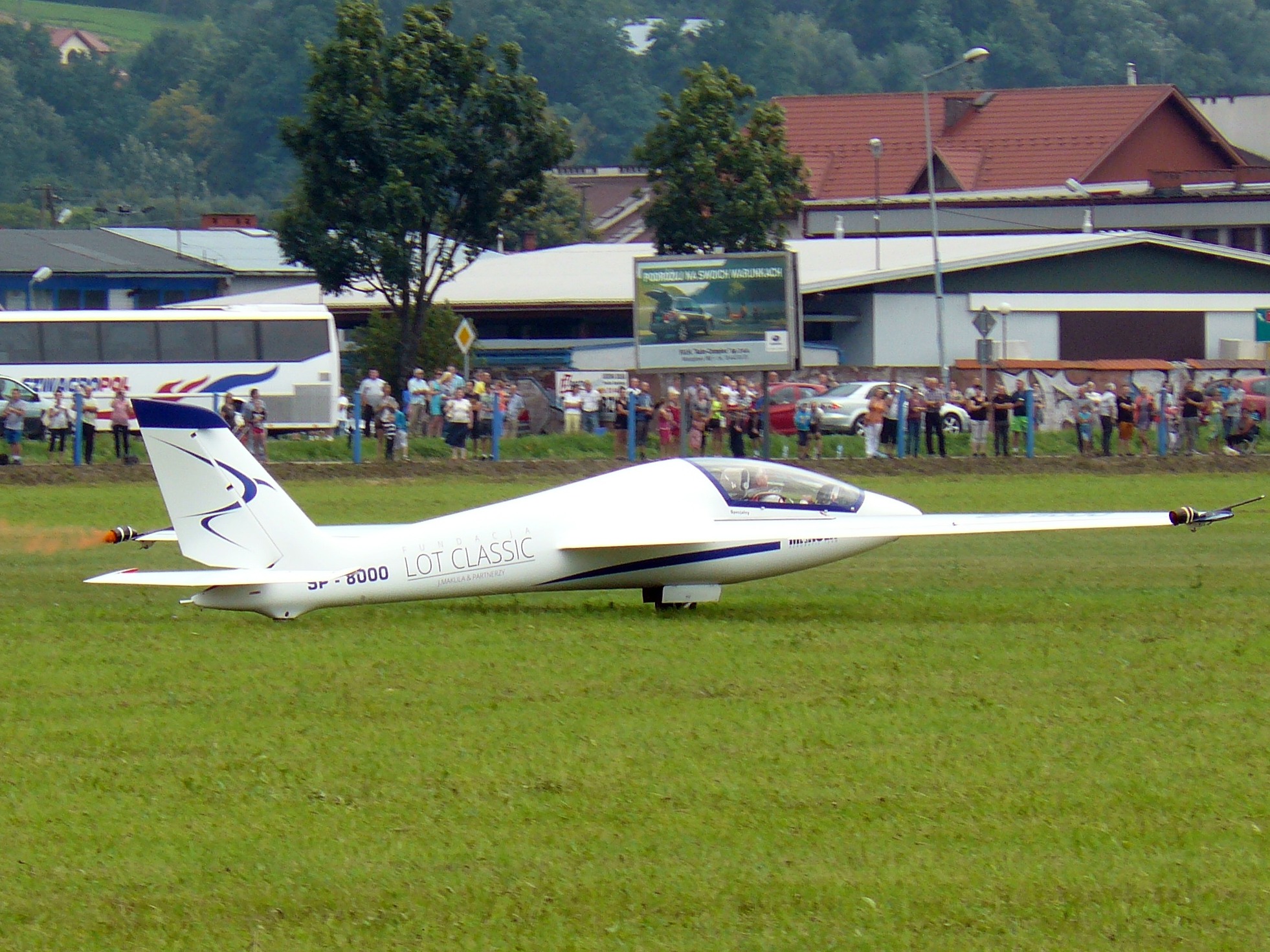 Szybowiec akrobacyjny Solo Fox SP-8000 w Łososinie Dolnej na Lotnisku Aeroklubu Podhalańskiego